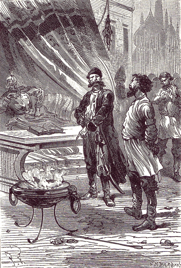 « Tu vas mourir » illustration du roman de Jules Verne Michel Stroff Editions Hetzel 1876